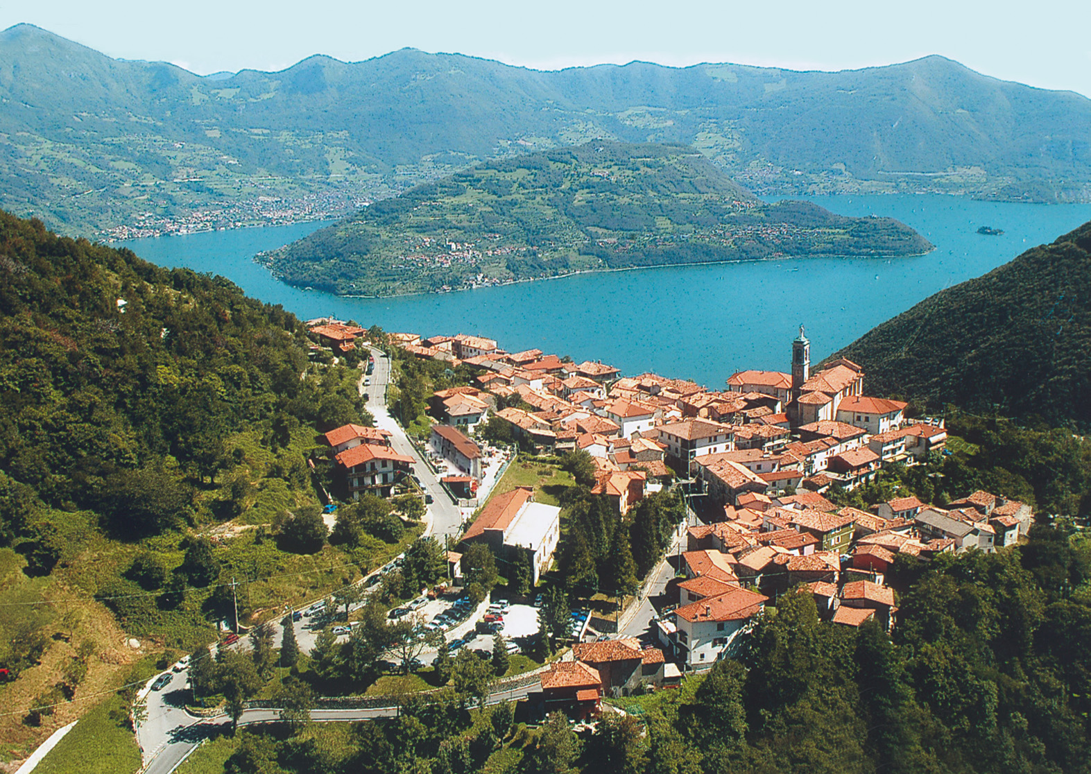 Parzanica